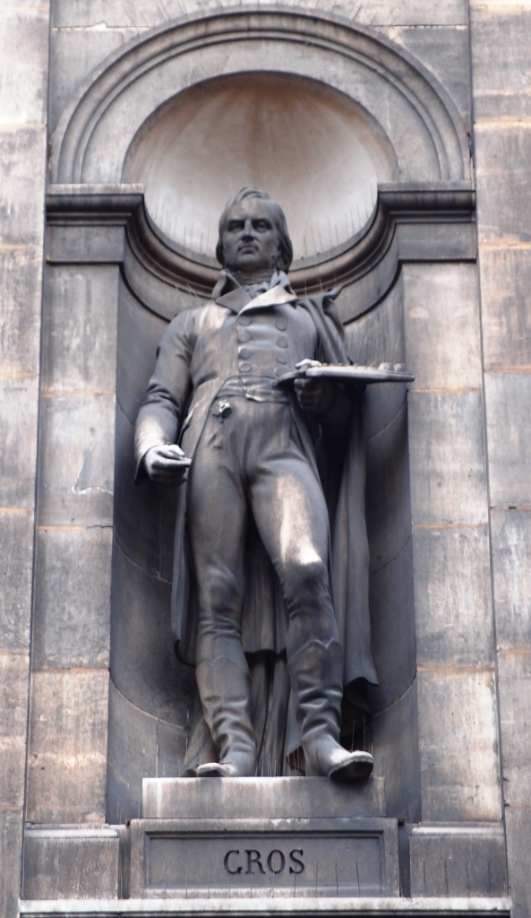 Statue des Malers Antoine-Jean Gros (1771-1835) am Rathaus von Paris